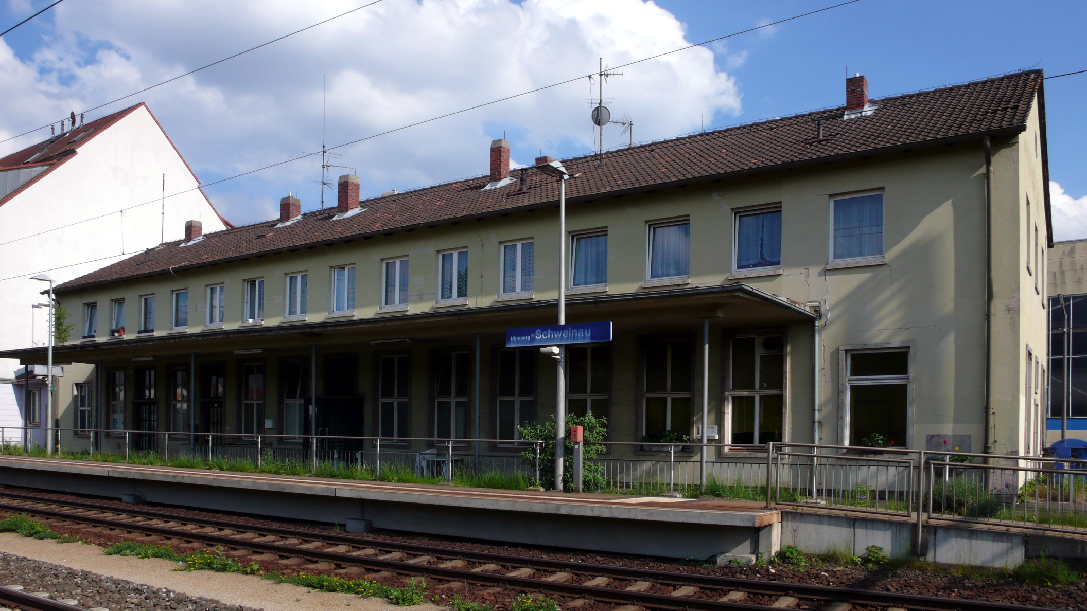 Bahnhof Nürnberg-Schweinau, Blick von Westen auf das ehemalige Empfangsgebäude